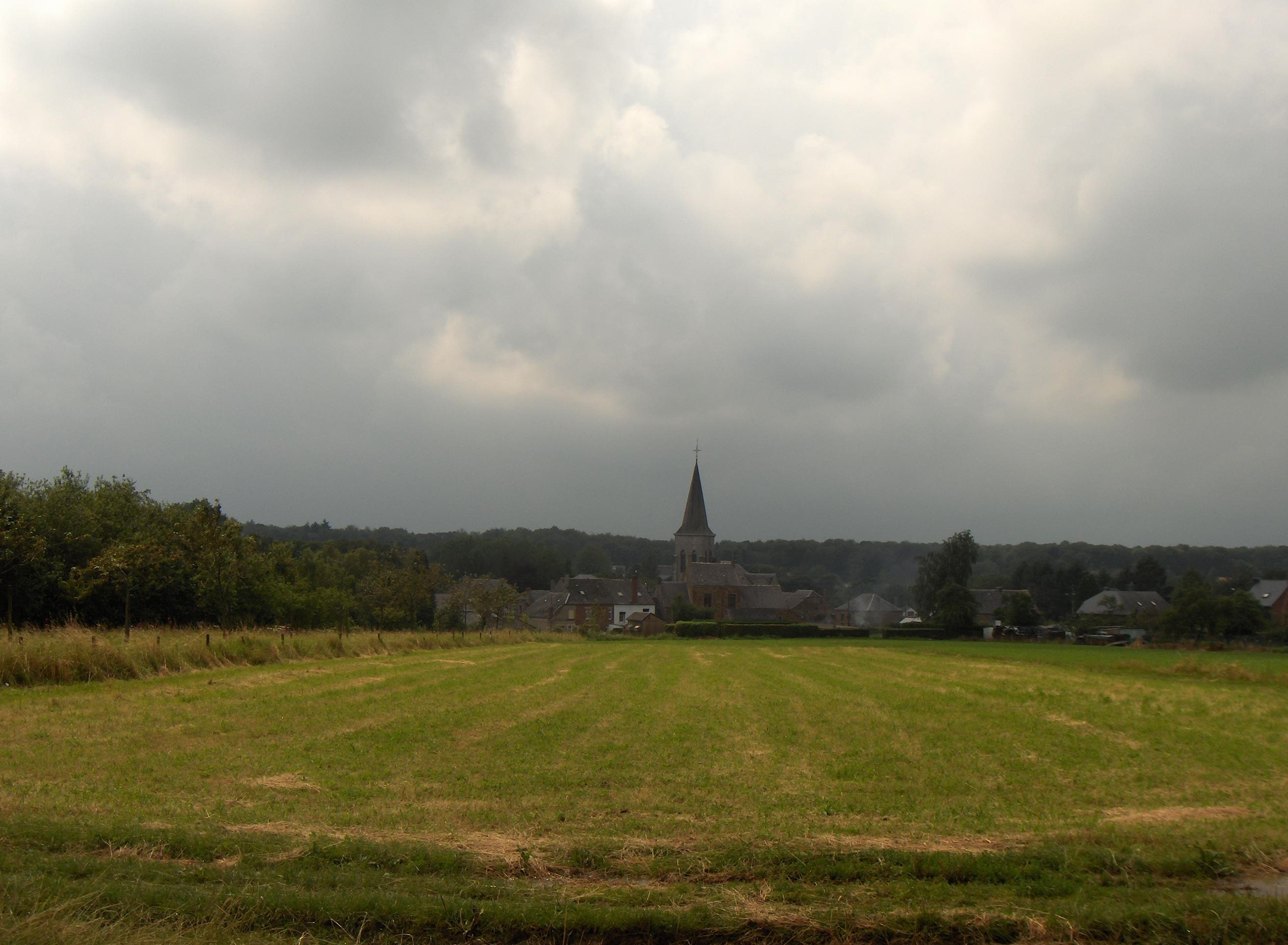 Presgaux, Ortsteil der Gemeinde Couvin (Belgien, Prov. Namur): Überblick von Westen